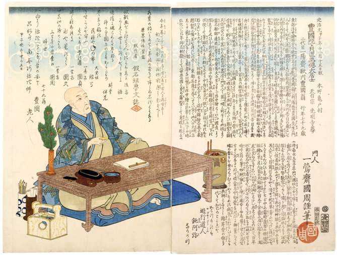 Memorial Portrait of Utagawa Kunisada